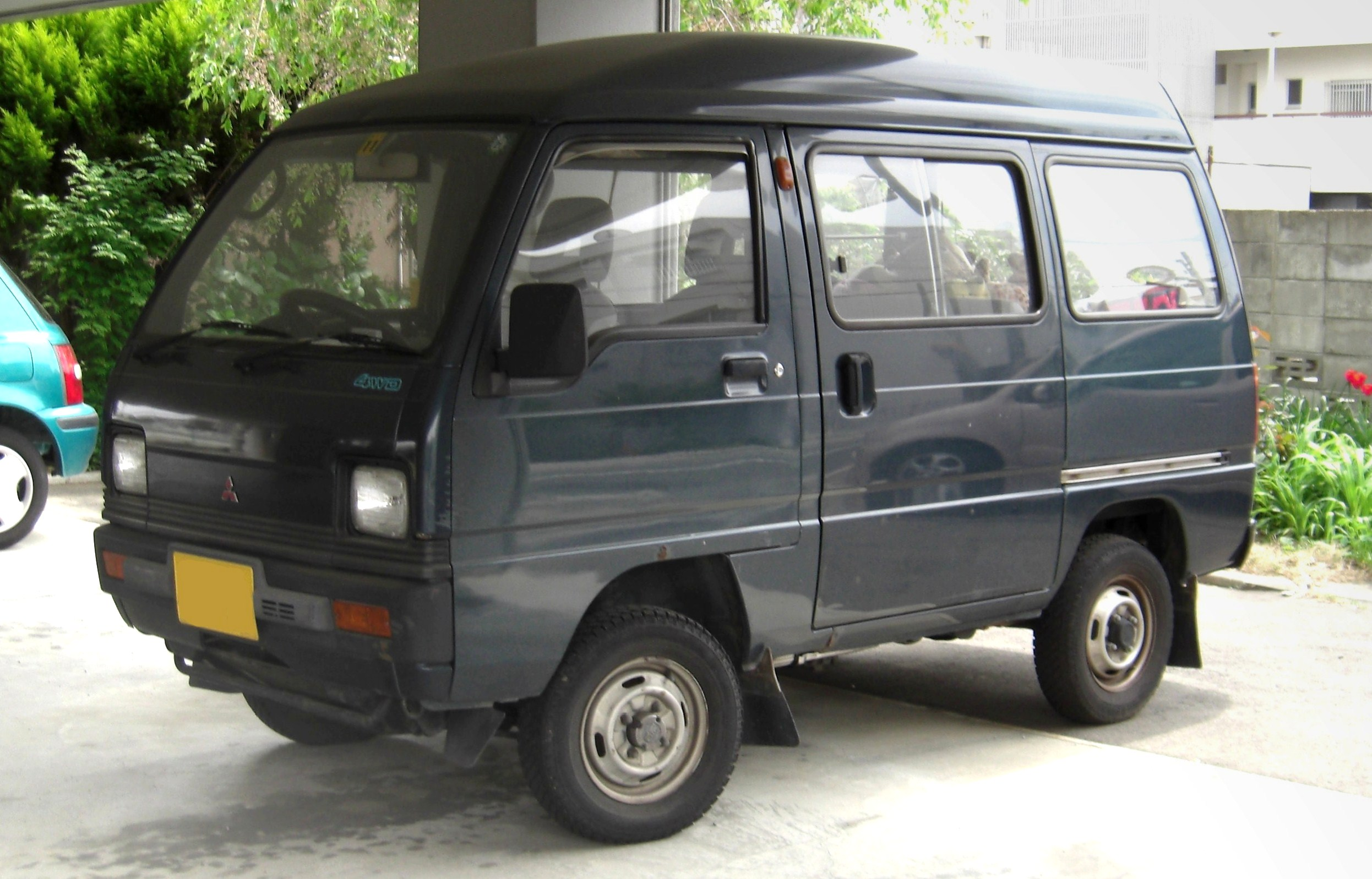 Mitsubishi Minicab